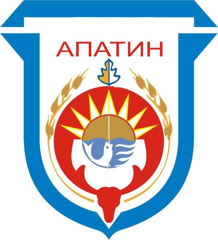 Blason de la ville d'Apatin en Serbie